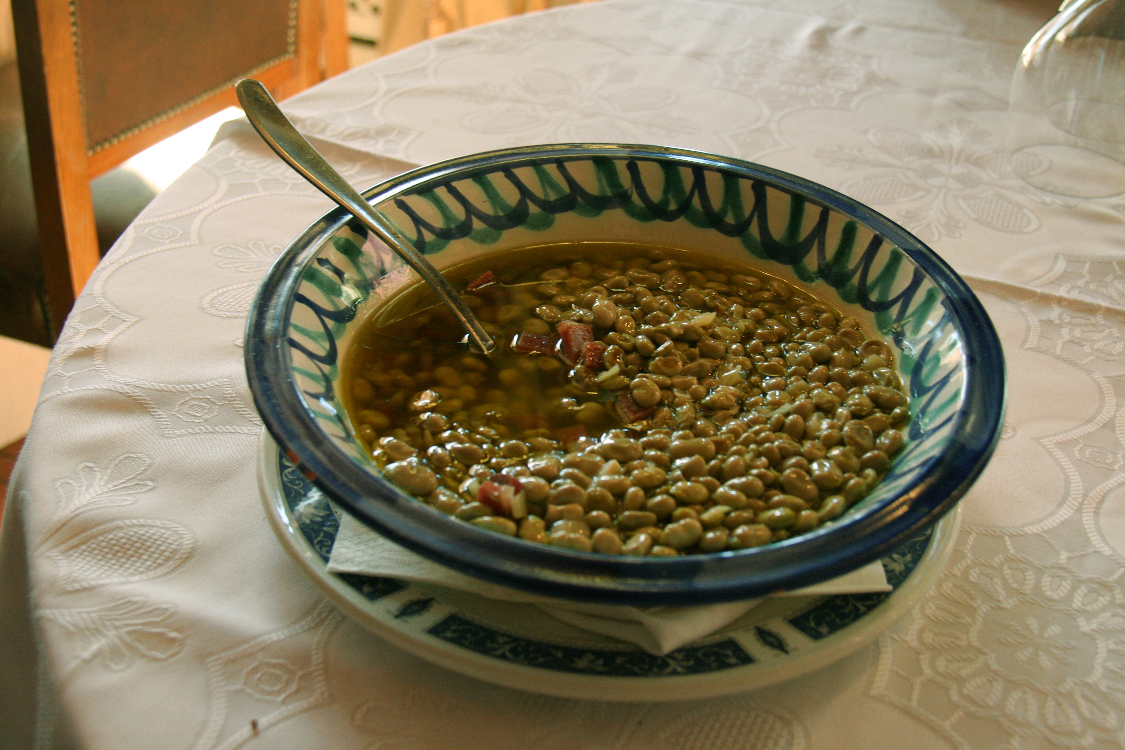 Bohnensuppe mit Stücken vom rohen Schinken nach Art von Granada